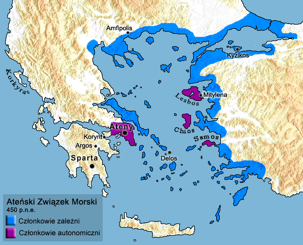 Ateński Związek Morski. Topografia na podstawie danych: GLOBE ETOPO2